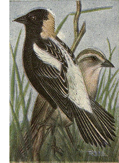 Bobolink.